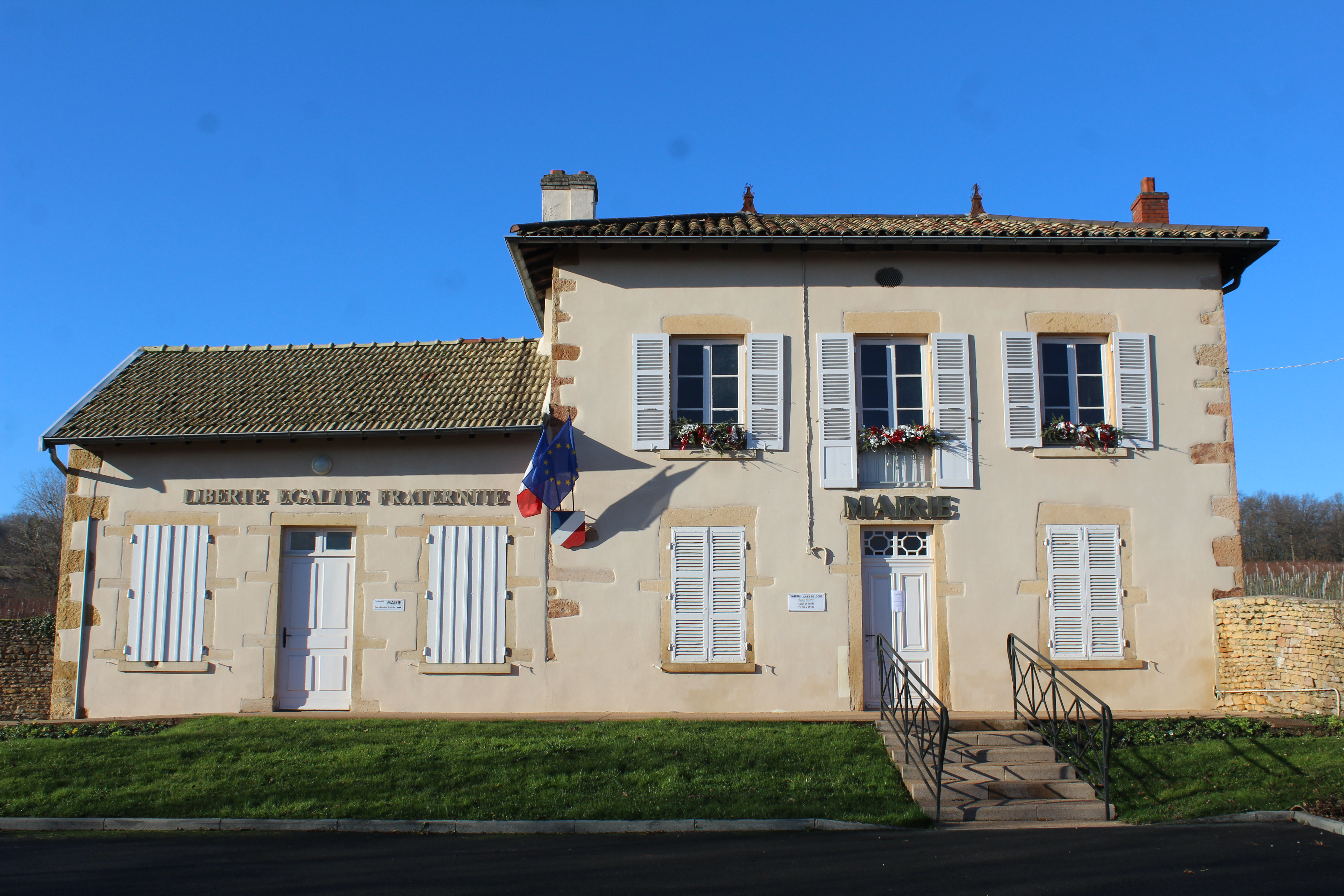 Mairie de la commune associée de Loché.